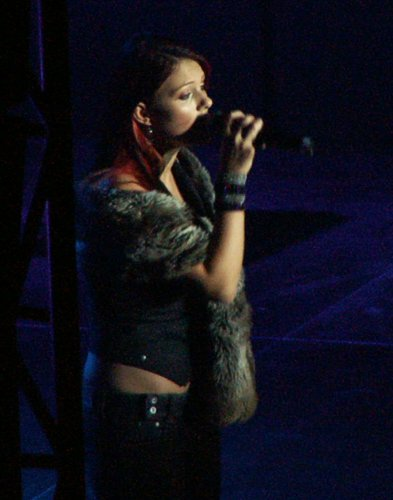 Šindlerová Martina, slovak singer, concert photo